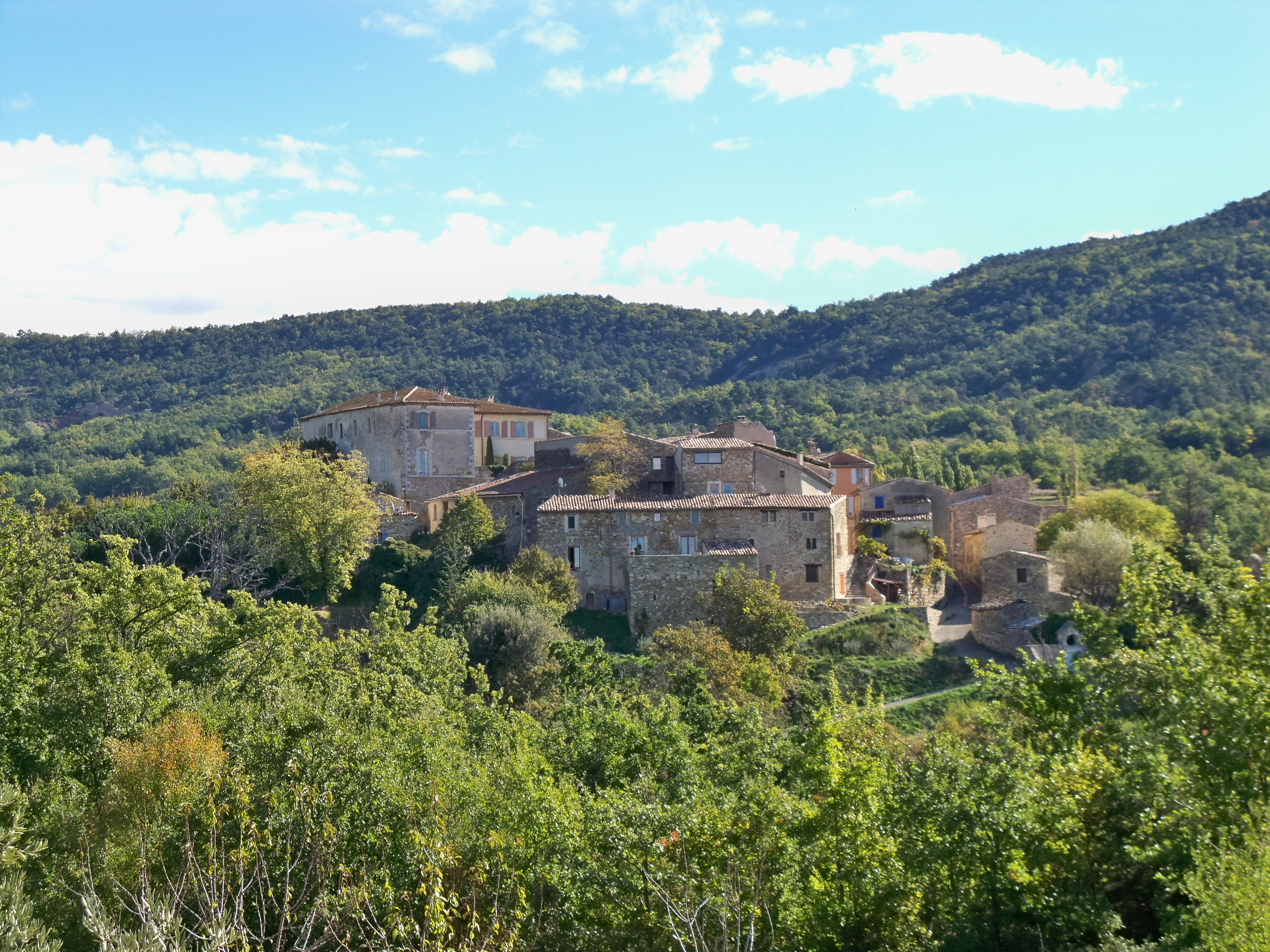 village de giganc, Vaucluse, France